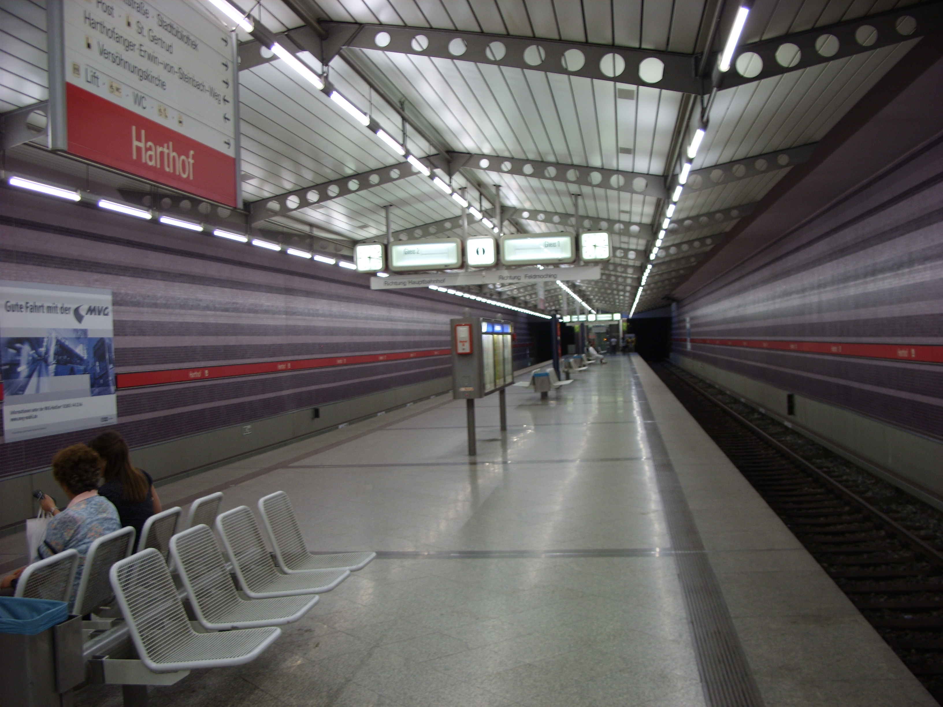 U-Bahnhaltestelle Harthof